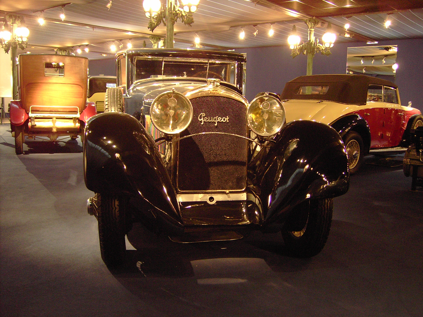 Peugeot Typ 174 1924 Musée National de l'Automobil, exhibition room (Mülhausen/Mulhouse, France)